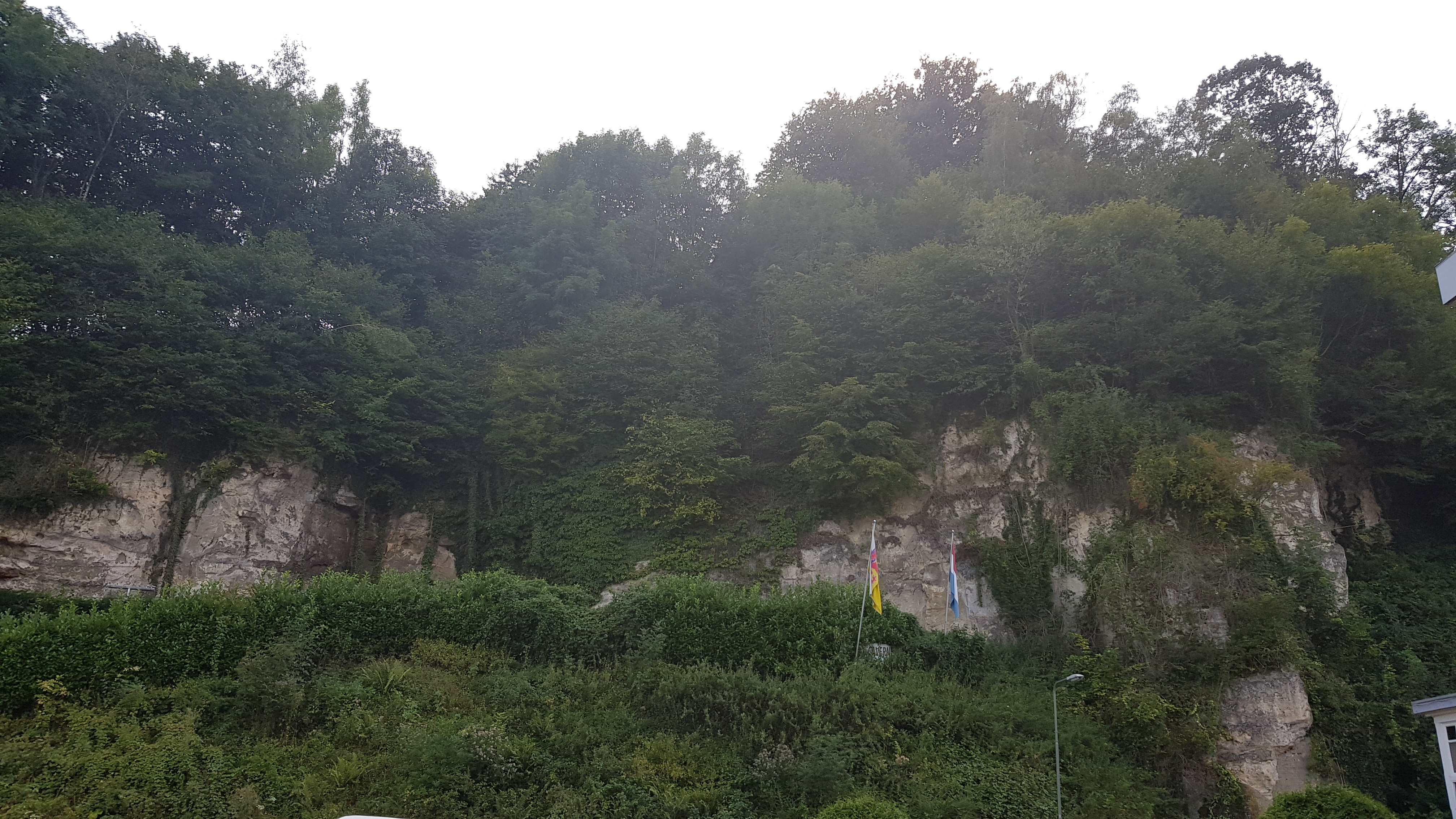 Koepelgroeve, Geulhem, Nederland